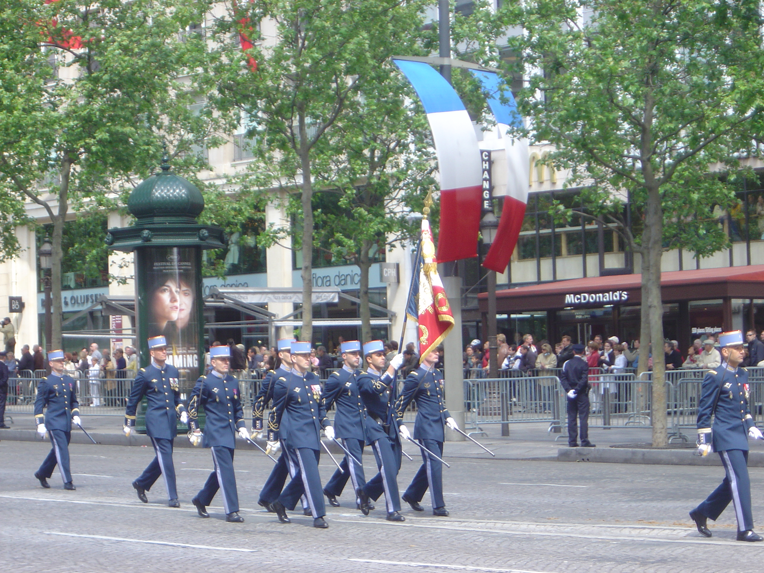 cérémonies de commémoration du 8 mai 1945 en 2005